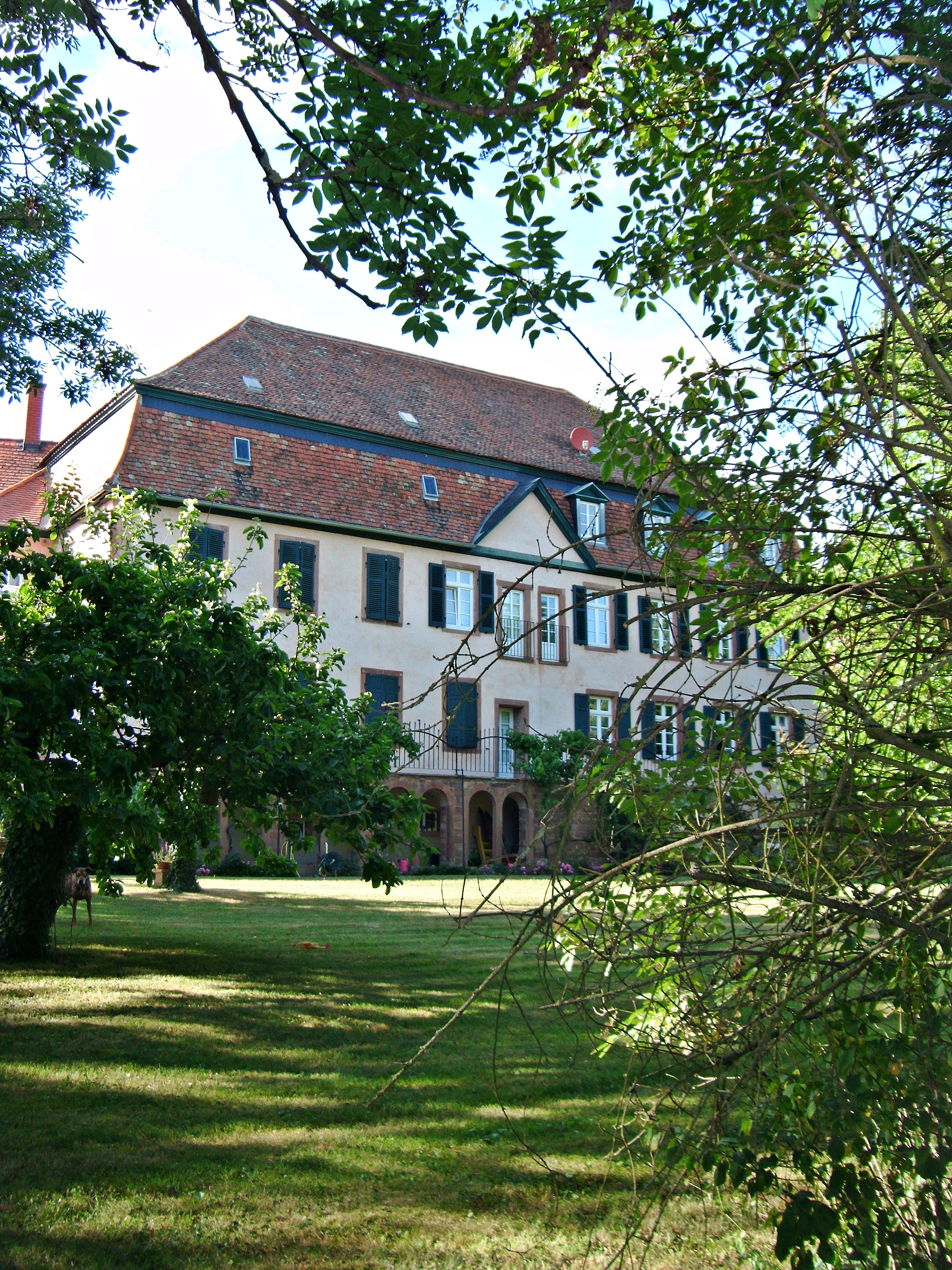 Quirnheim, ehem. Merz`sches Schloss (früher Hertlingshauser Hof), mit Schlosspark, von Osten